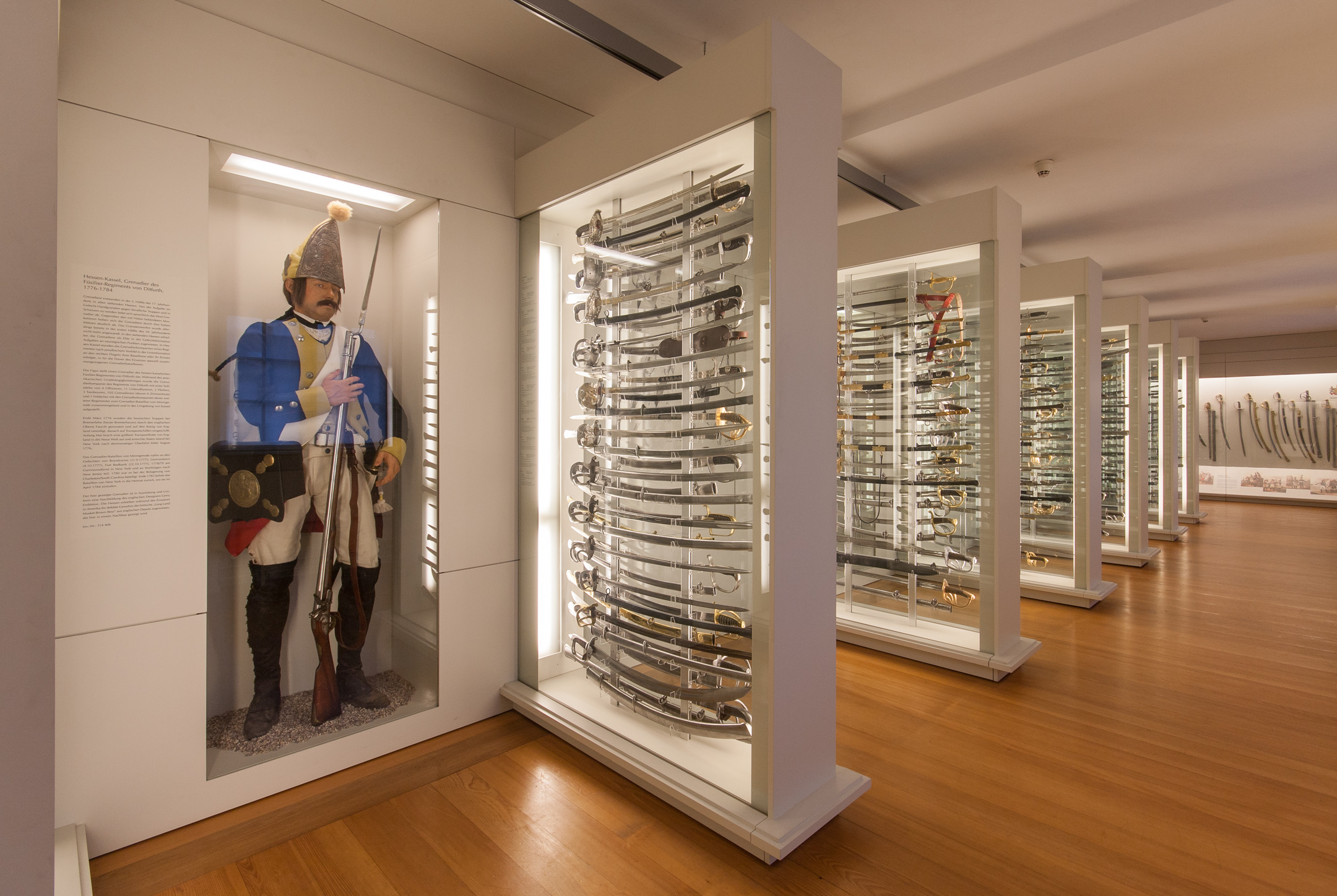 Blankwaffen im Wehrgeschichtliches Museum Rastatt.